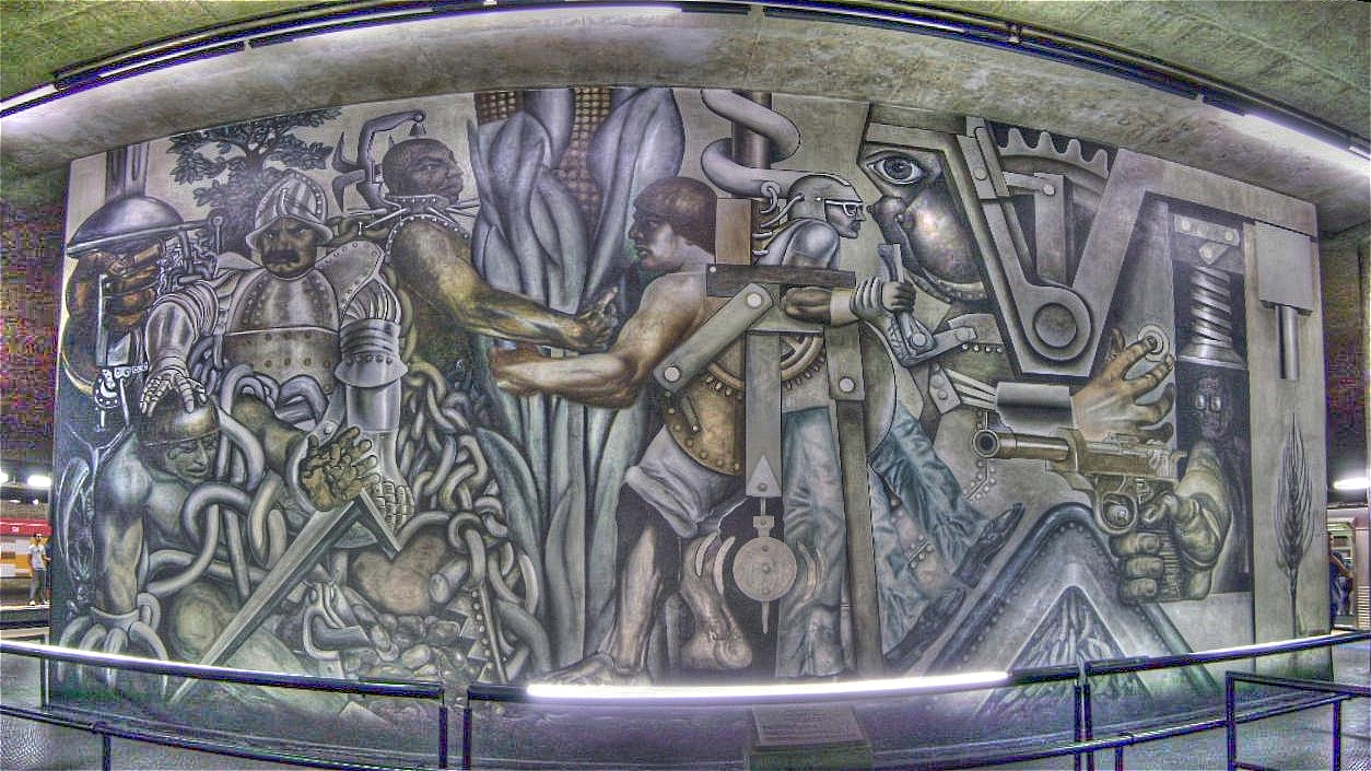 Mário Gruber - "Como sempre esteve, o amanhã está em nossas mãos", 25/01/87, Metrô Pça. da Sé.